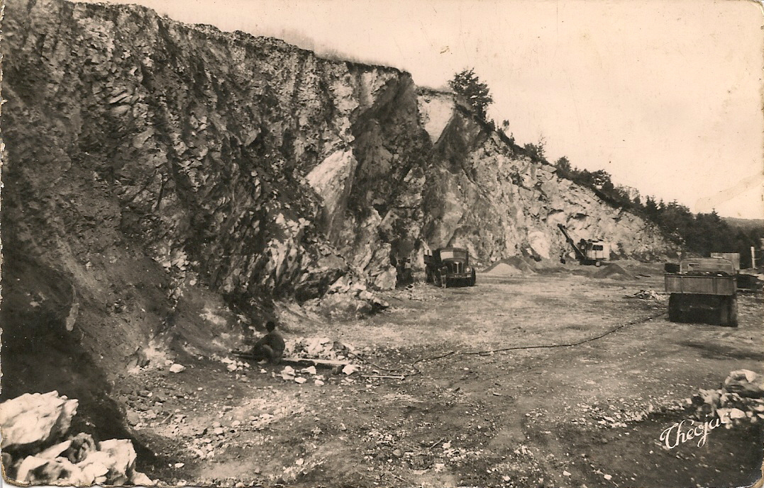 Les carrières de granit des Rochettes (exploitées par M. Linaress).